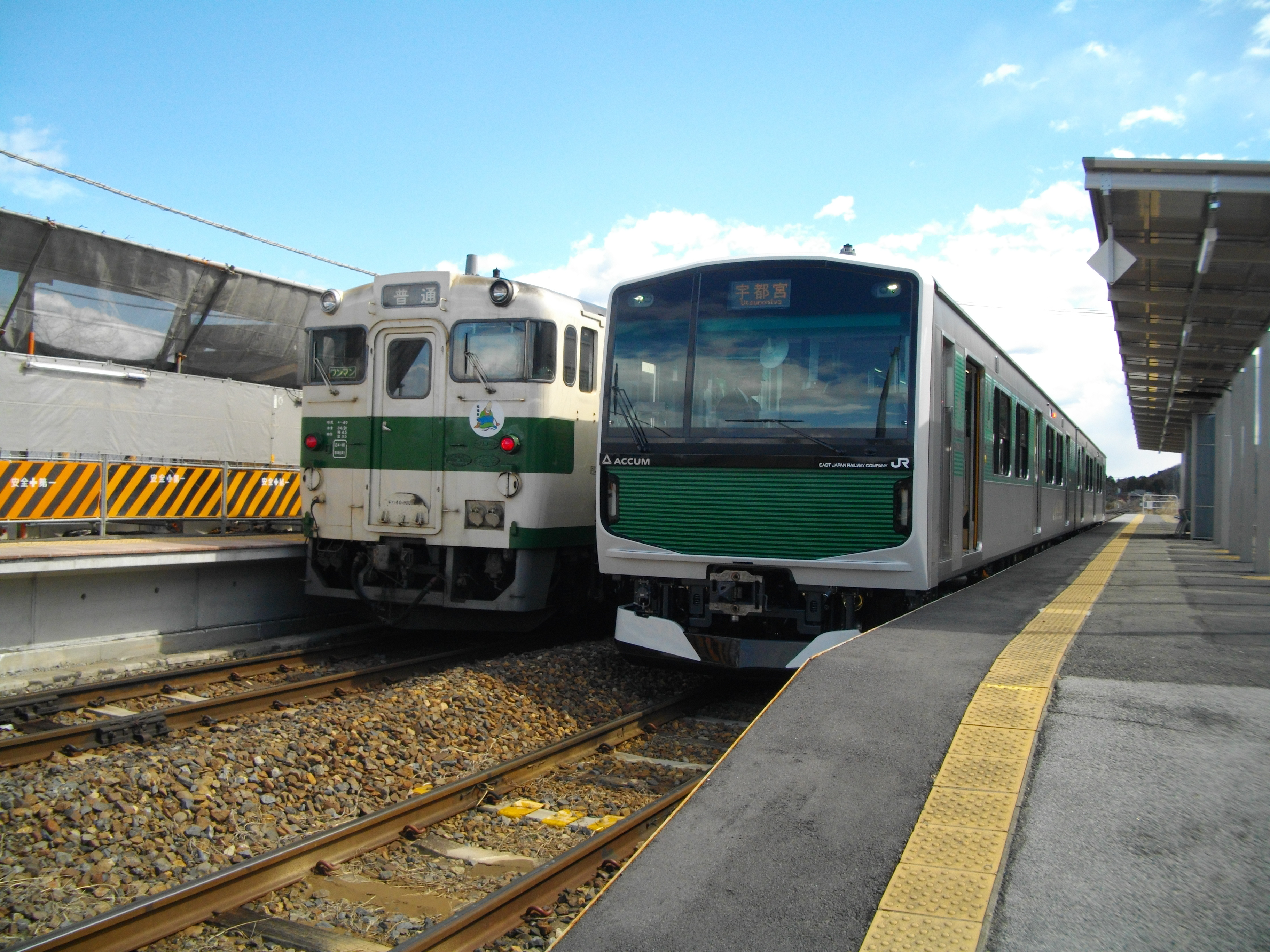 大金駅で列車交換するEV-E301系（上り）とキハ40（下り）。